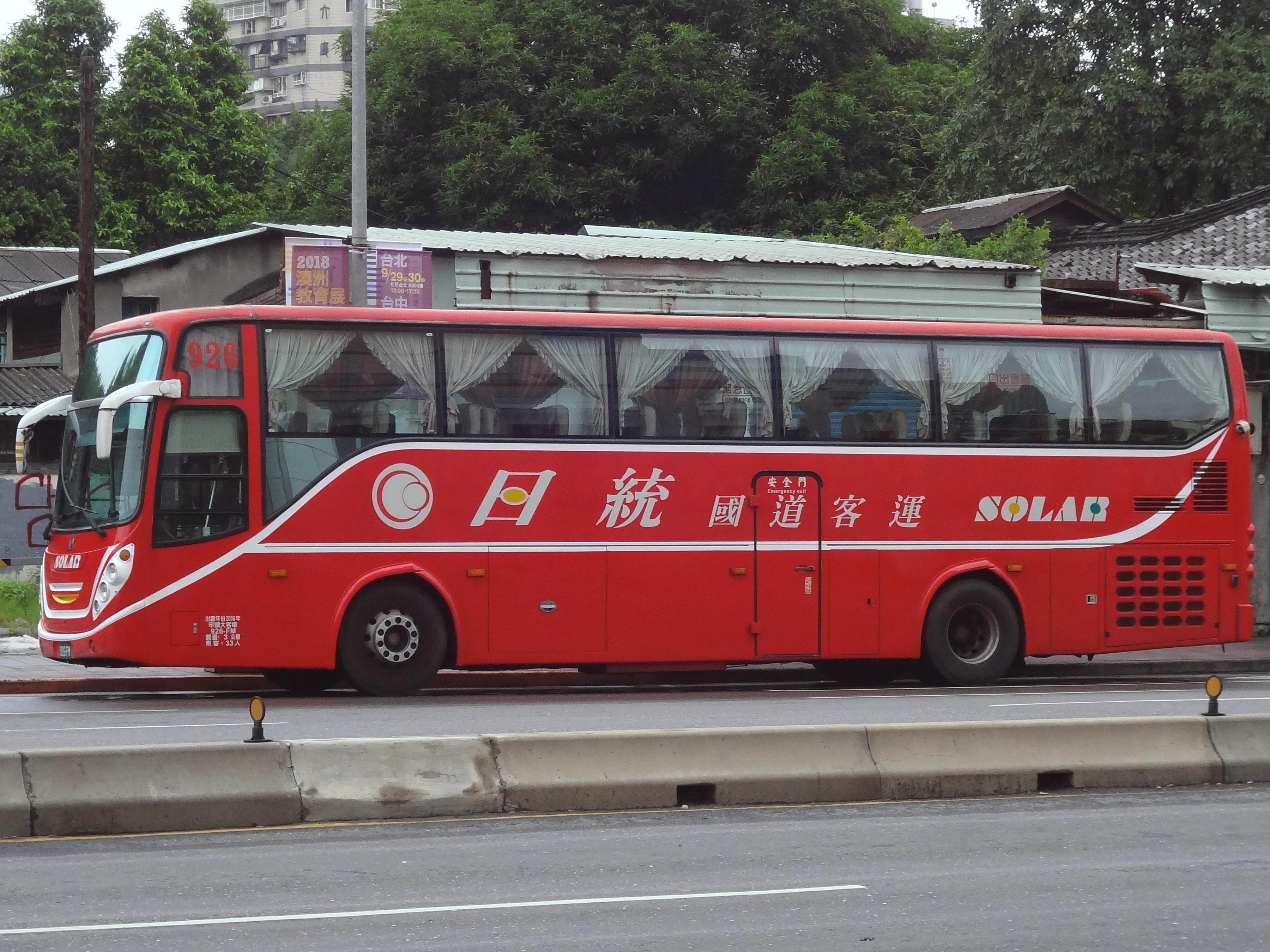 中文（台灣）: 日統客運2006年Volvo B12B大客車926-FM，停靠日統客運台北站。